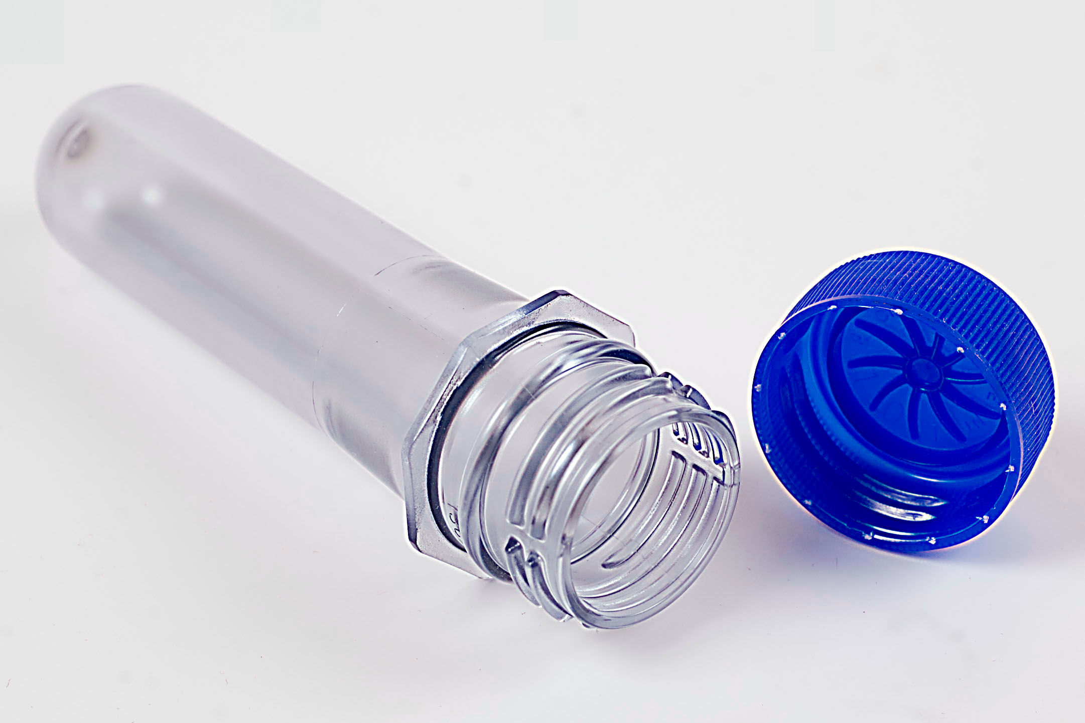 PET-Preform, PET-Rohling, PETling. - Der Schraubverschluß ist aus Polyethylen (PE) gefertigt.